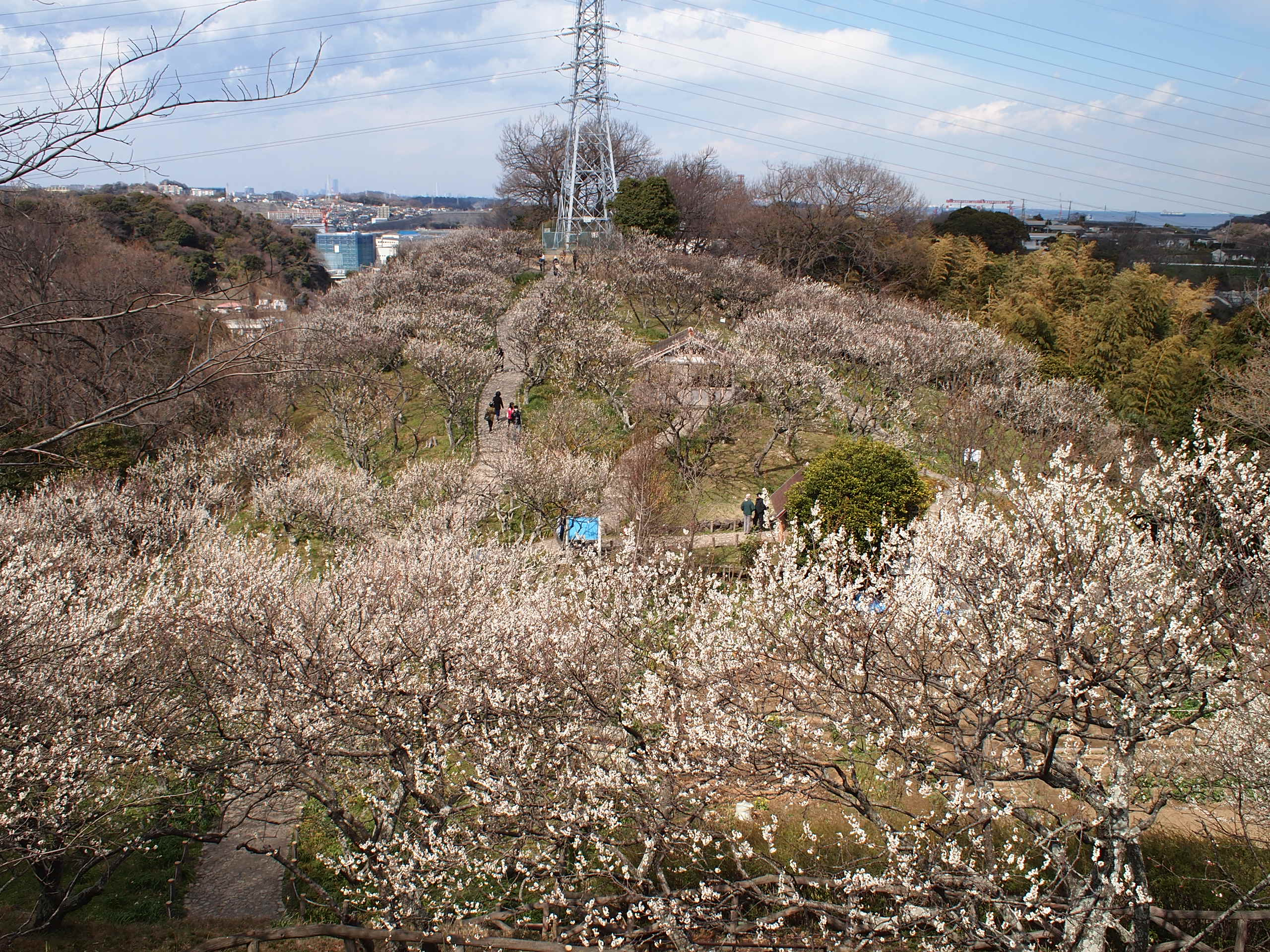 田浦梅の里（田浦梅林） 神奈川県横須賀市。2012年3月25日撮影。